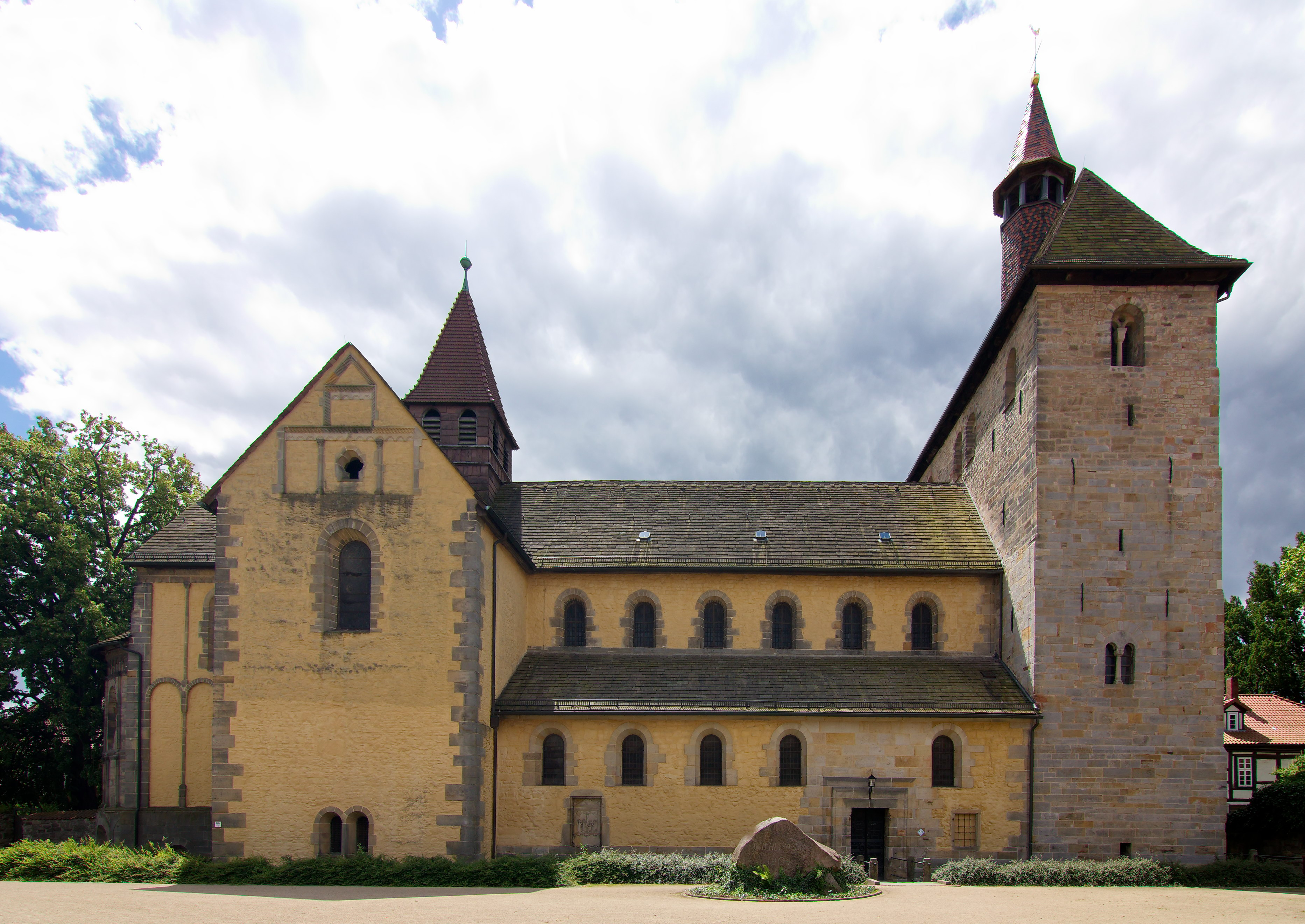 Stift Fischbeck in Fischbeck (Hessisch Oldendorf), Niedersachsen, Deutschland